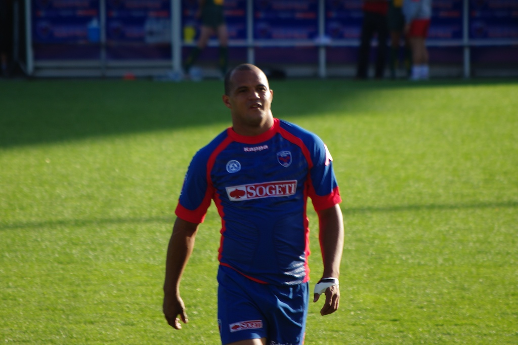 Wylie Human, ailier du FC Grenoble rugby.